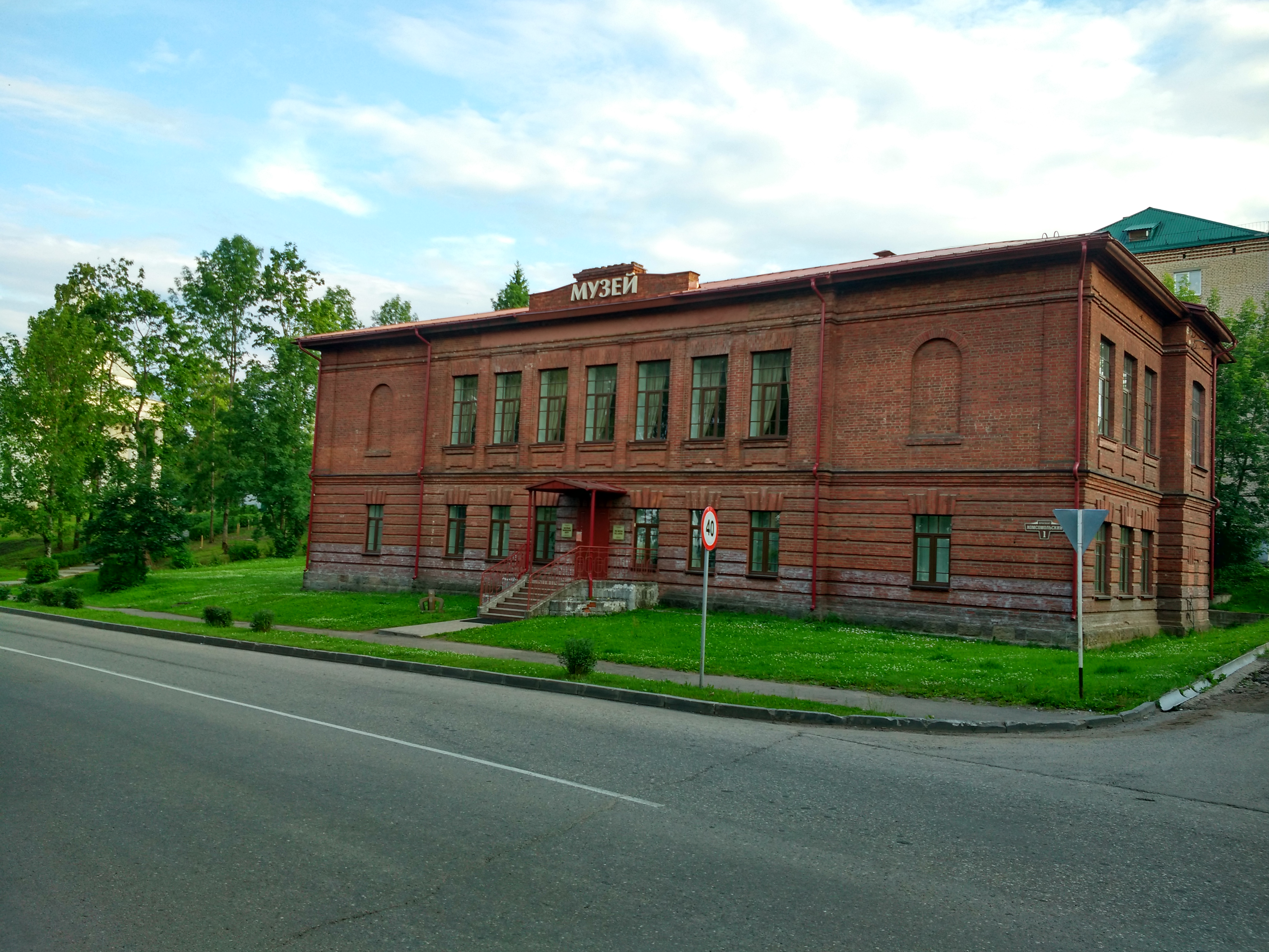 Училище: проспект Комсомольский, 1/7, Валдай, Валдайский район, Новгородская область